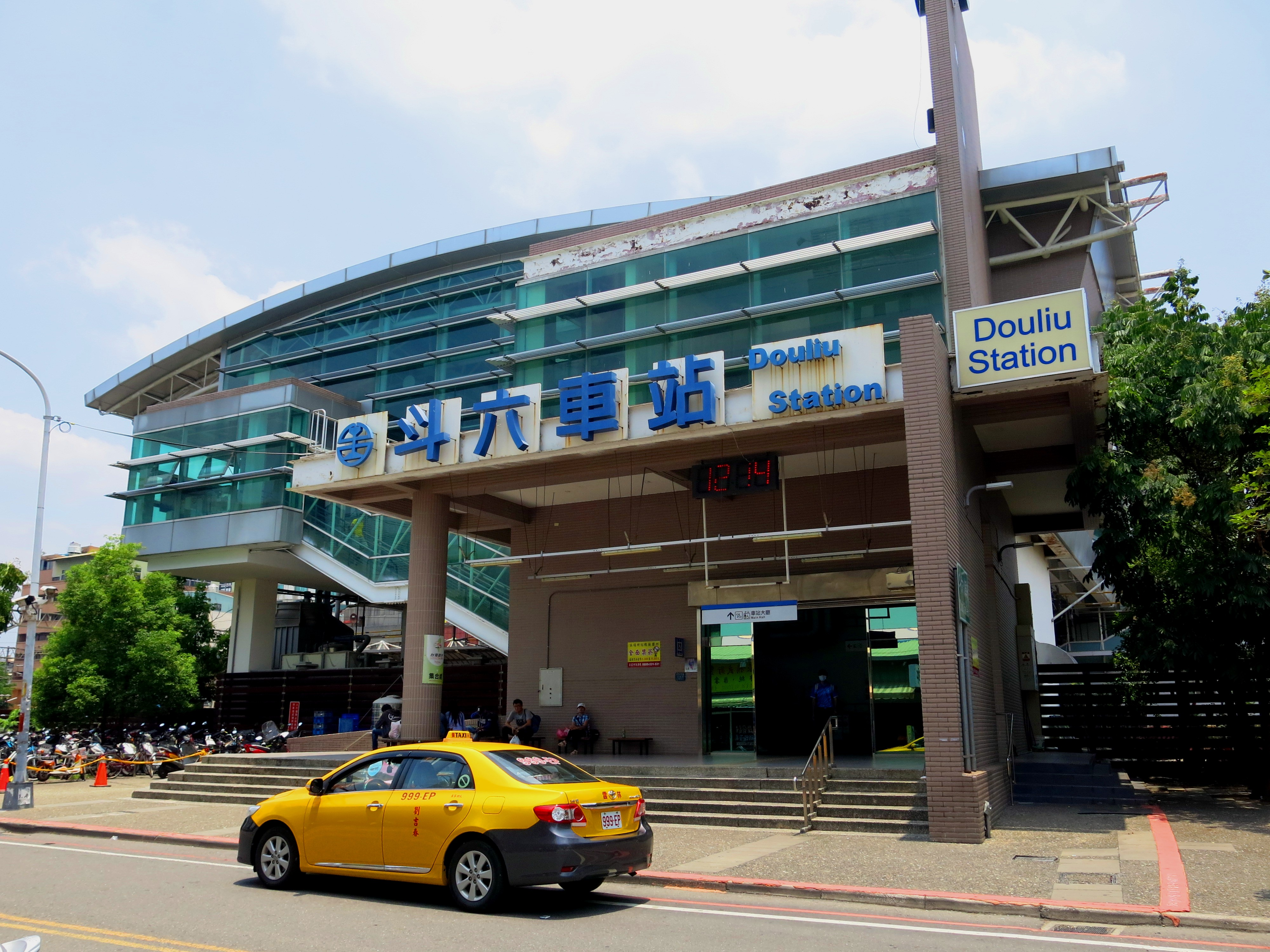 中文（台灣）: 台灣鐵路管理局斗六車站後出口